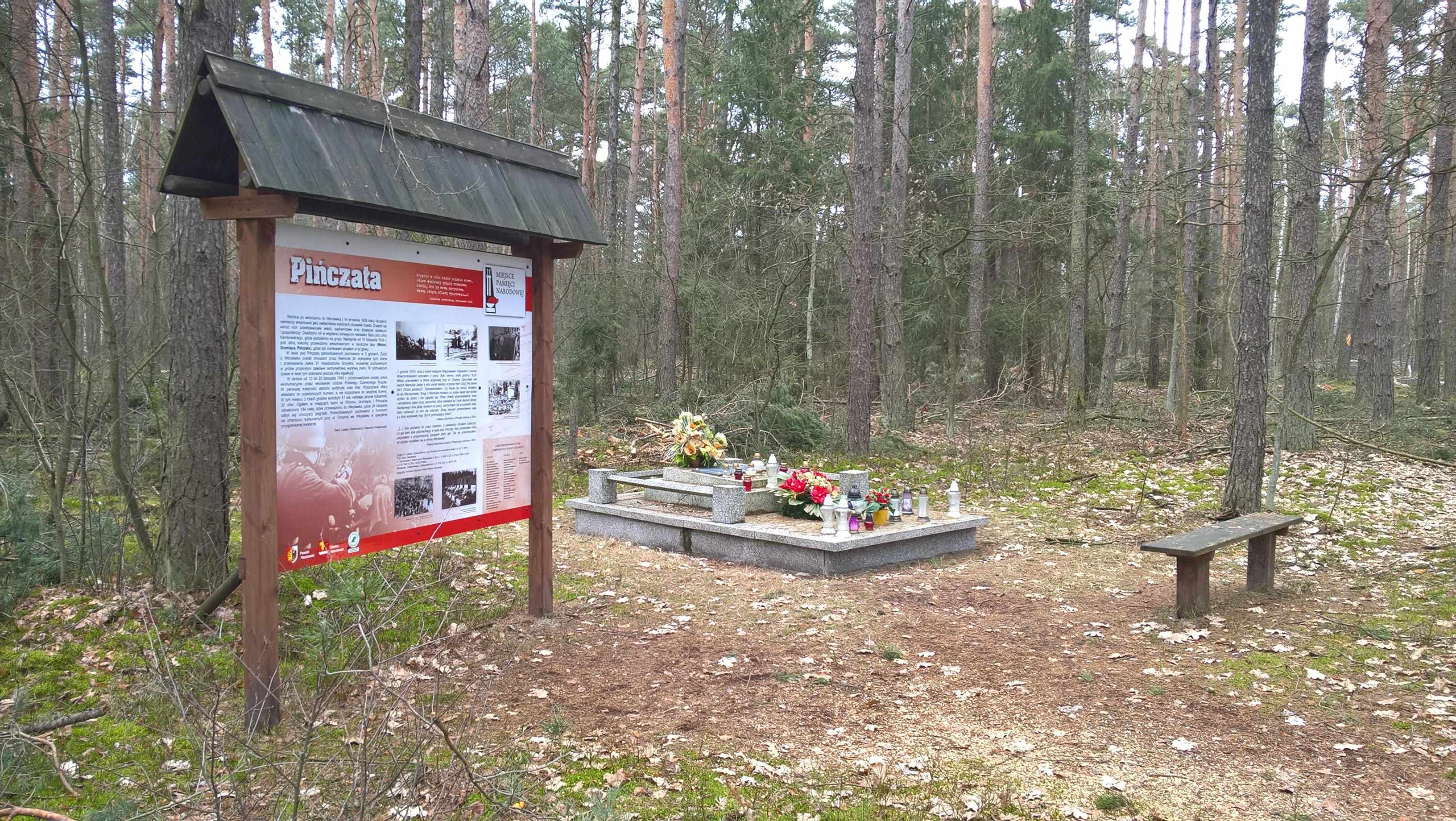 Jedno z miejsc upamiętnienia włocławian zamordowanych przez Niemców, znajdujące się w lesie nieopodal miejscowości Pińczata.